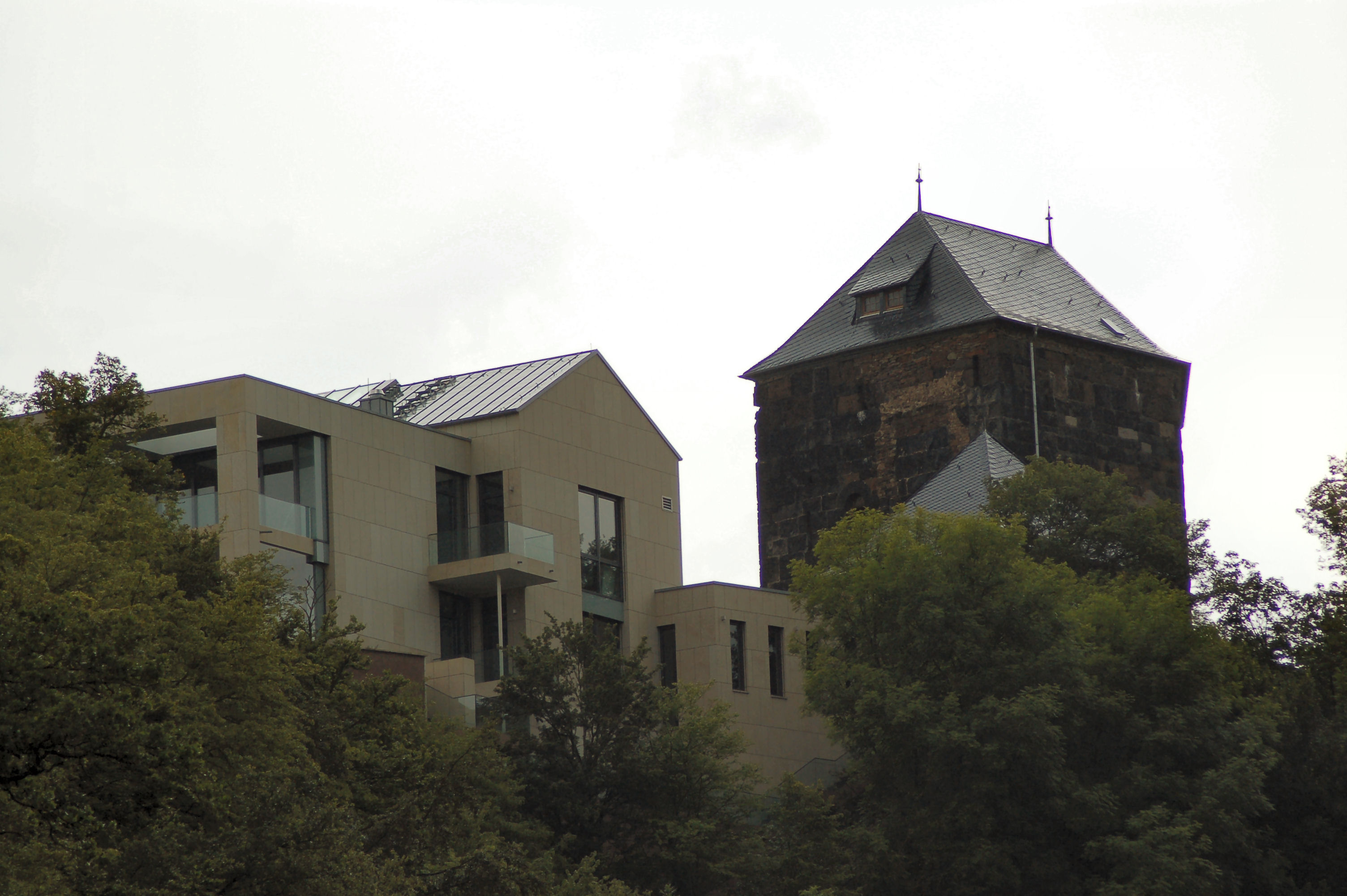 Burg Altenwied in der Gemeinde Neustadt (Wied).